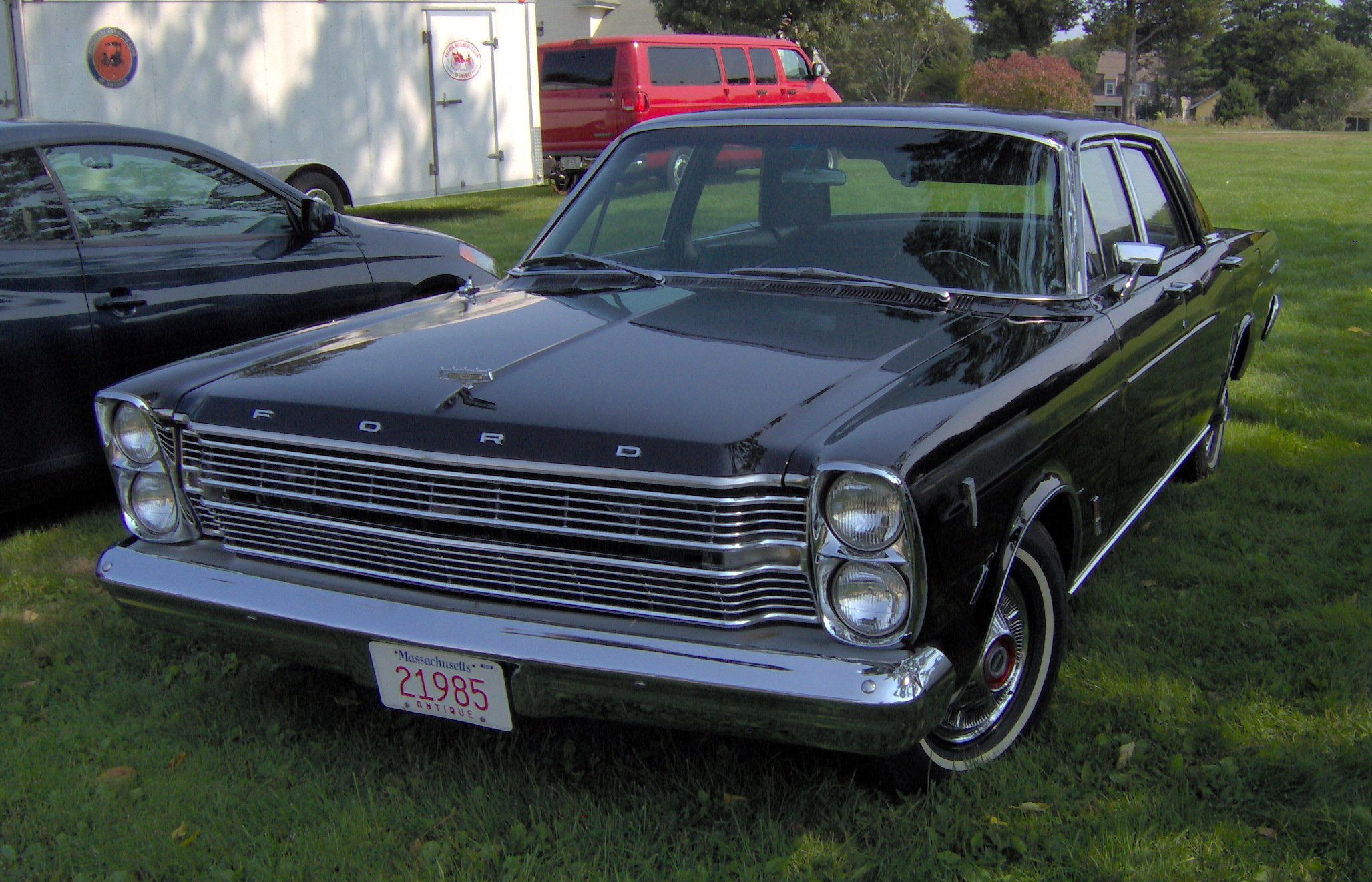 1966 Ford Galaxie 500 390